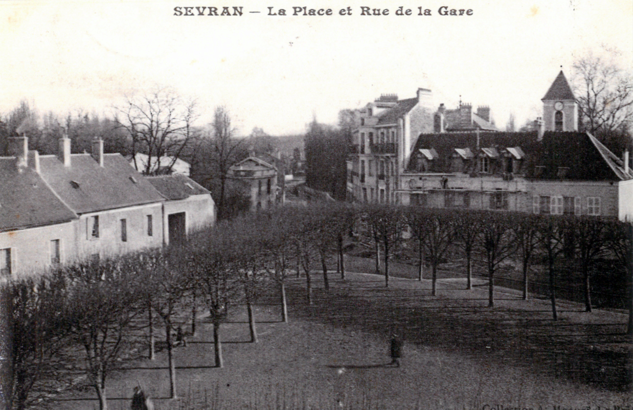 La place et Rue de la gare de Sevran vers 1900 (?)